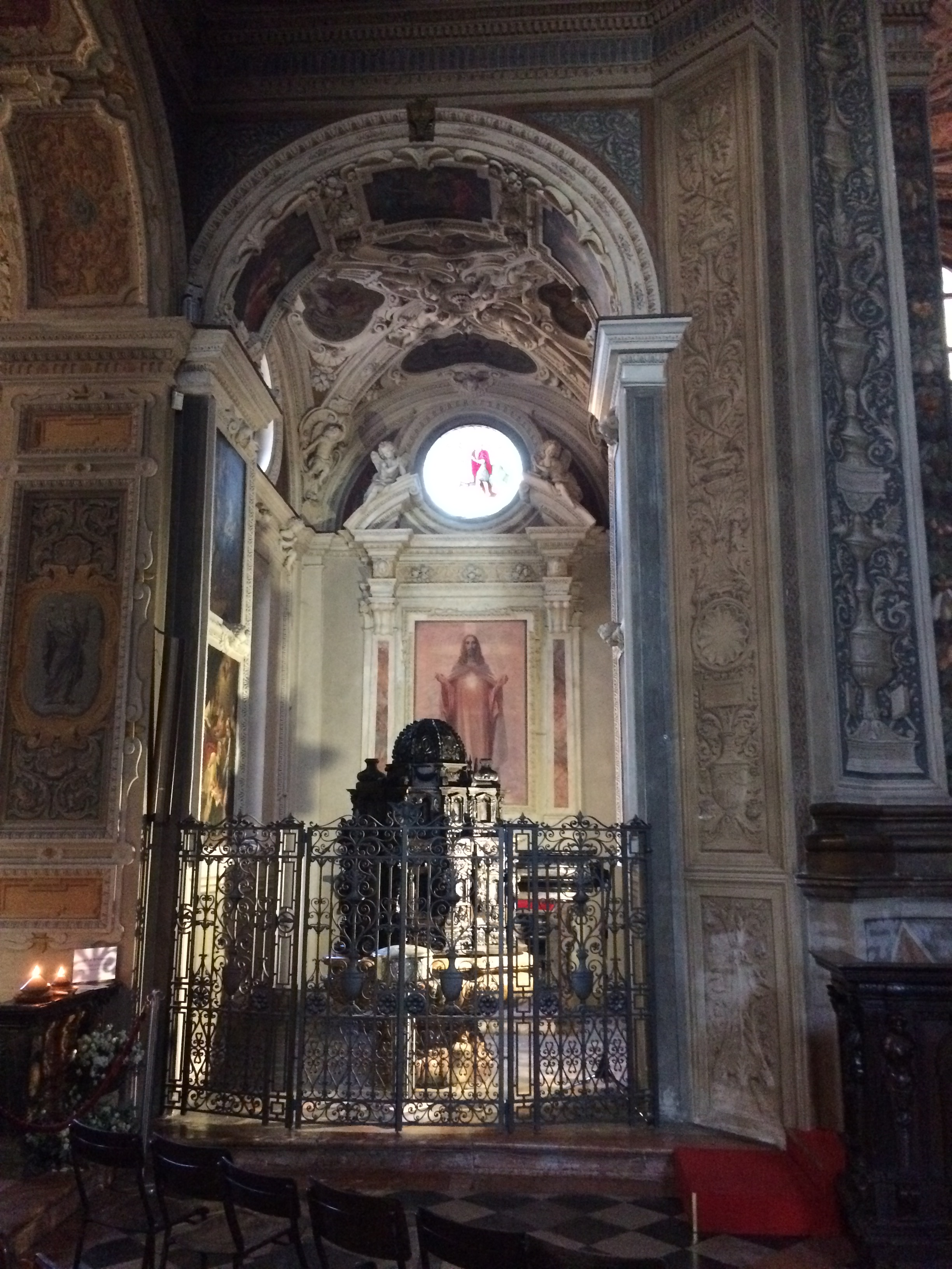 Cappella del Sacro Cuore - Basilica di San Magno